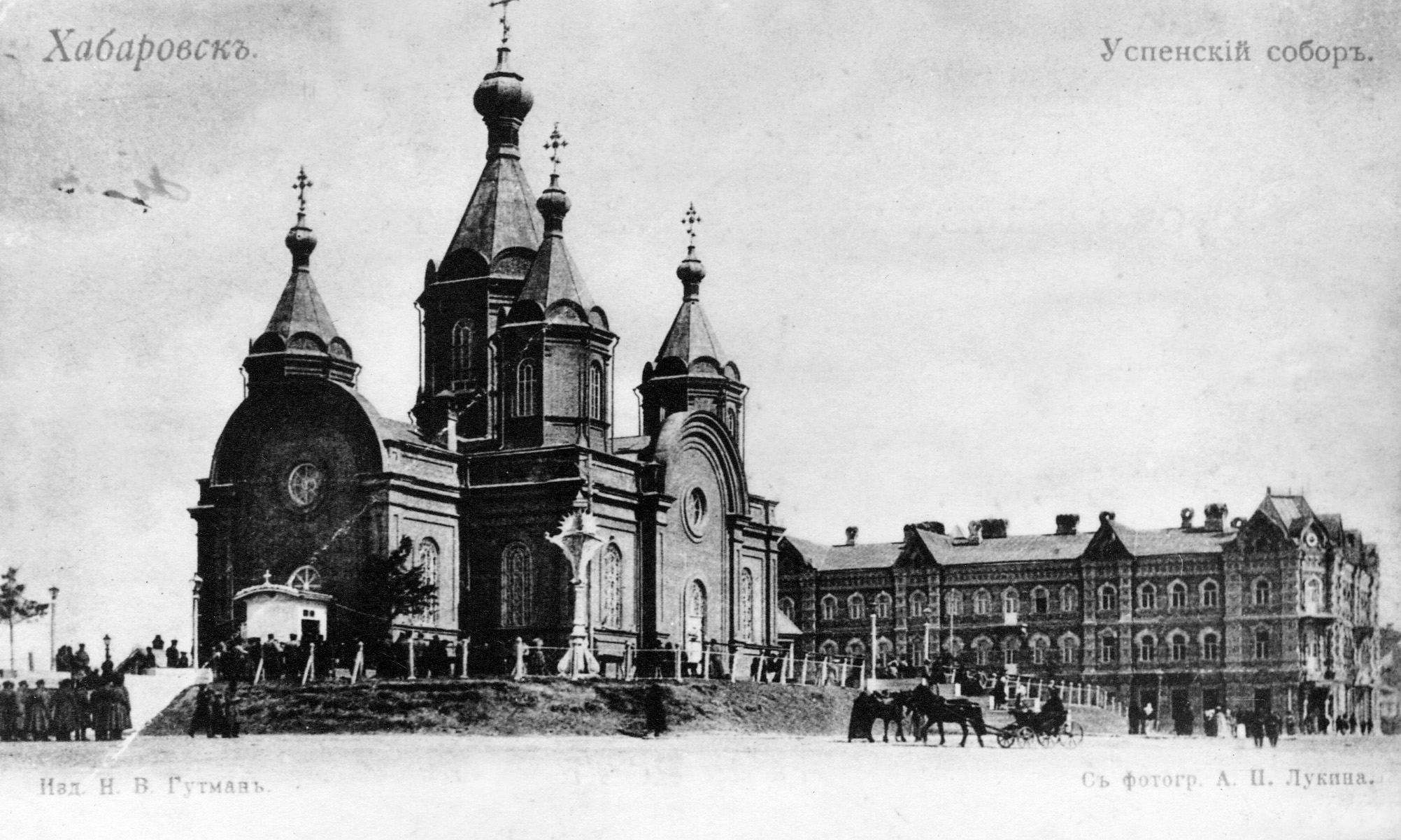 Изначальный Градо-Хабаровский собор